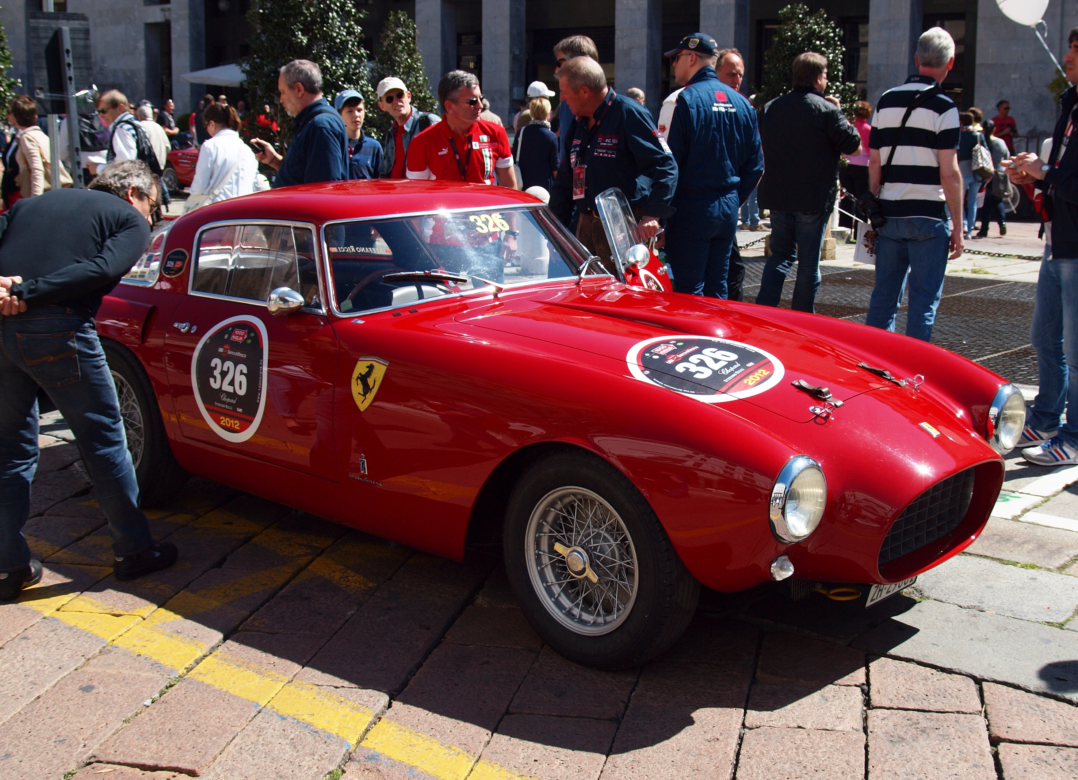 1000 Miglia - Freccia Rossa 2012 FERRARI 250 MM 1953